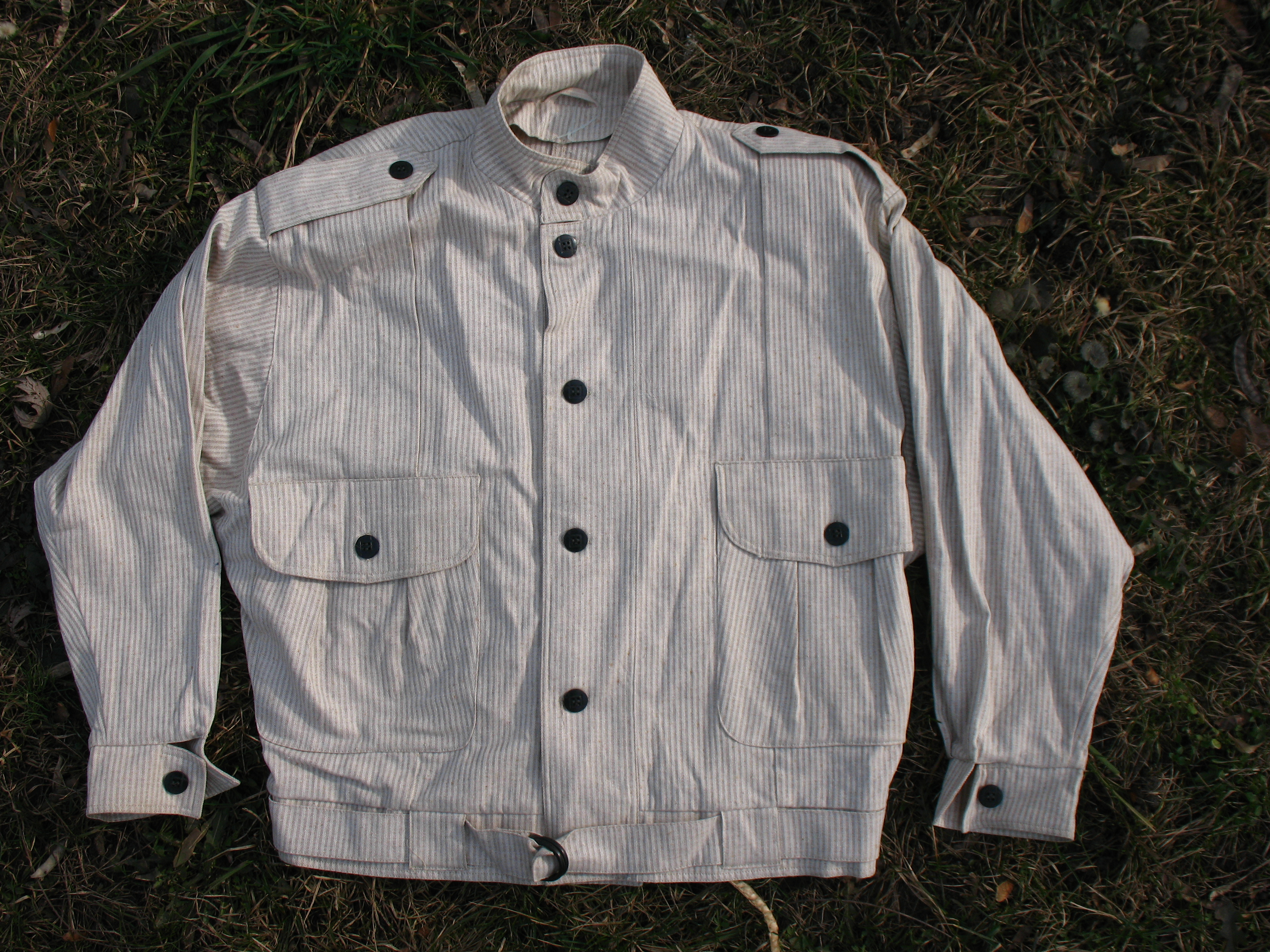 Куртка летняя мужская х/б. СССР, МПШО (Московское производственное щвейное объединение) "Радуга". Рост 170 см, размер 92 (46-й), объем бёдер 80 см. 100-процентный хлопок.